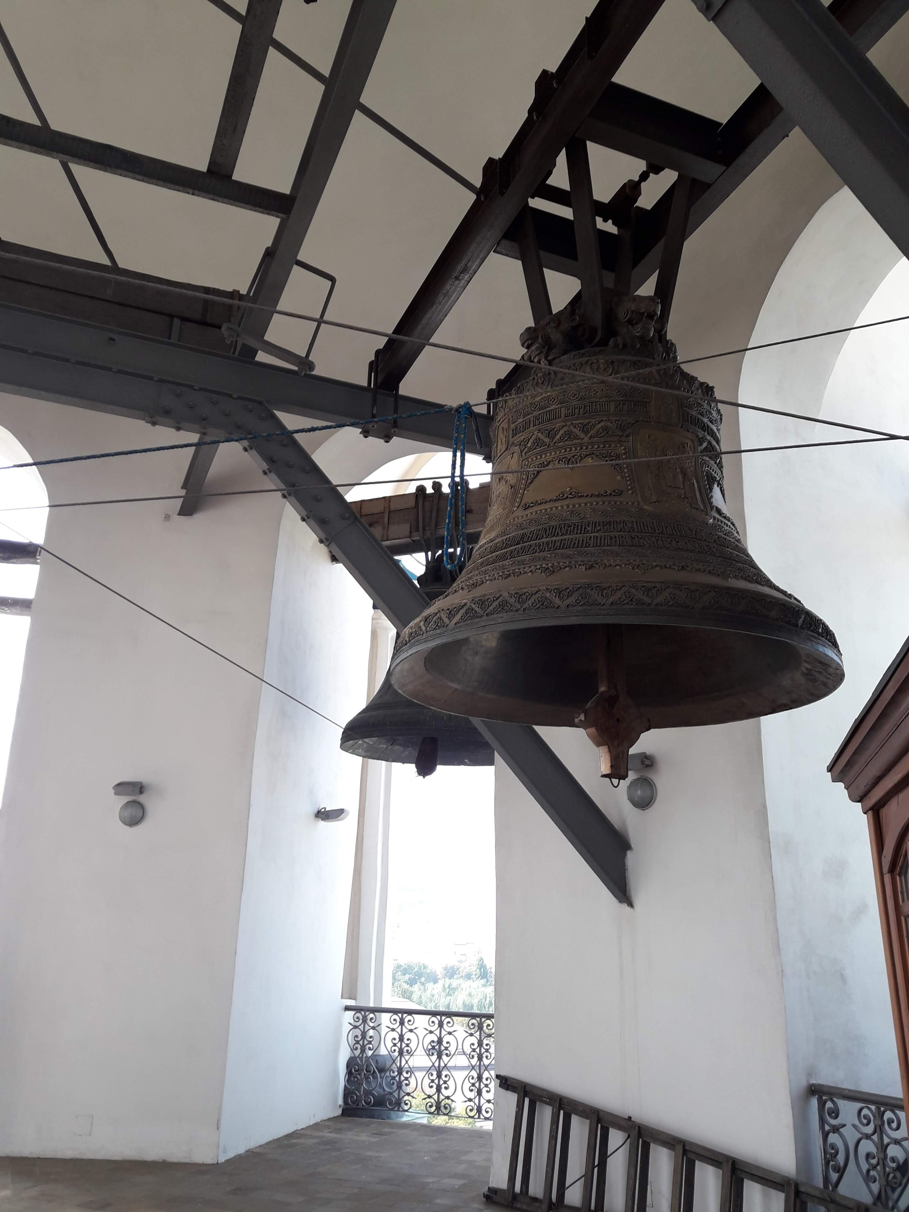 дзвони на Києво-Печерській дзвіниці